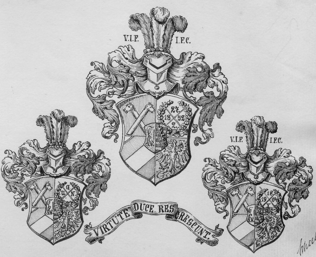 Wappen der Corps des Saxenkartell